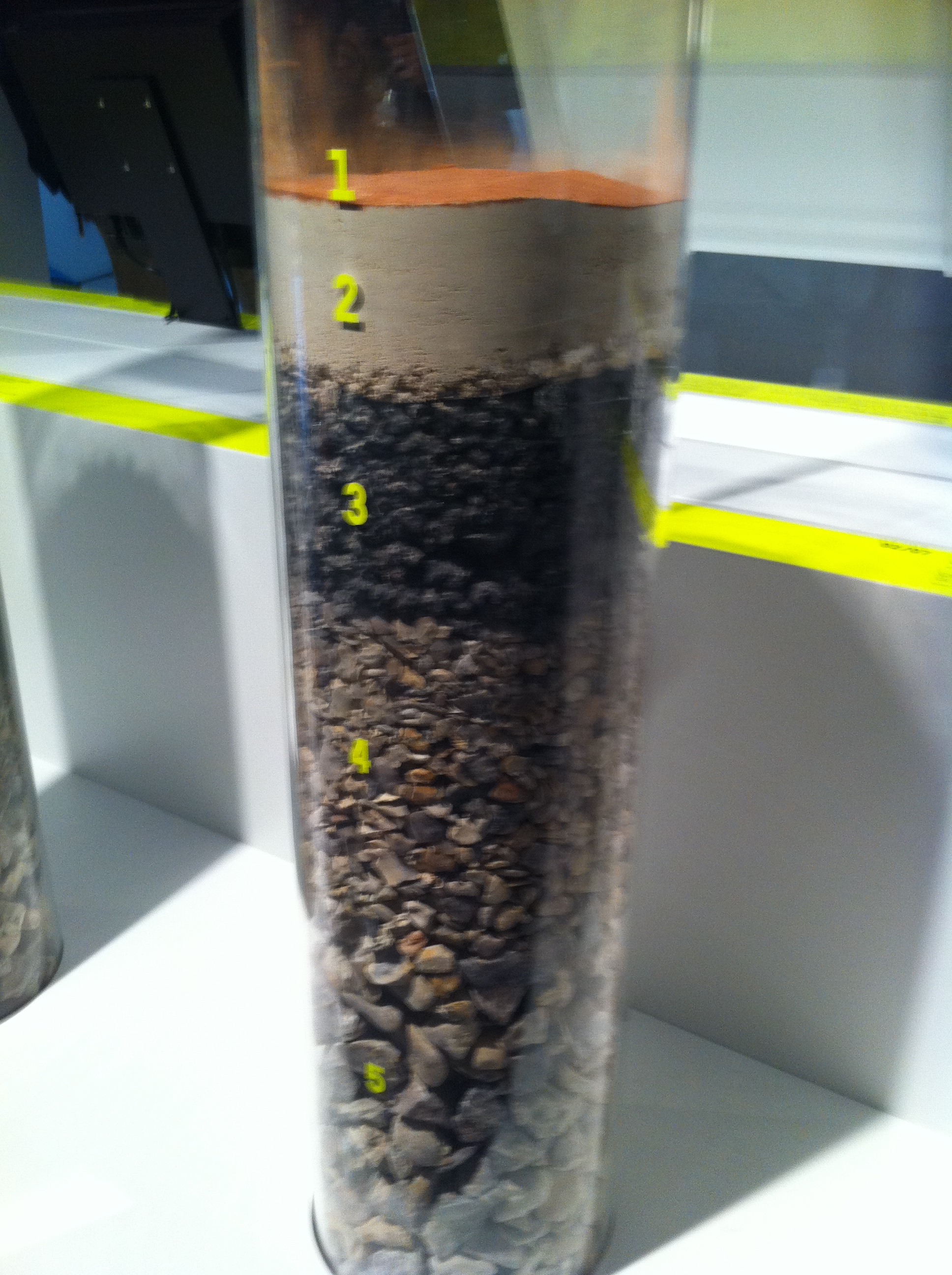 Detalle de la composición de la superficie de tierra batida del torneo Roland Garros